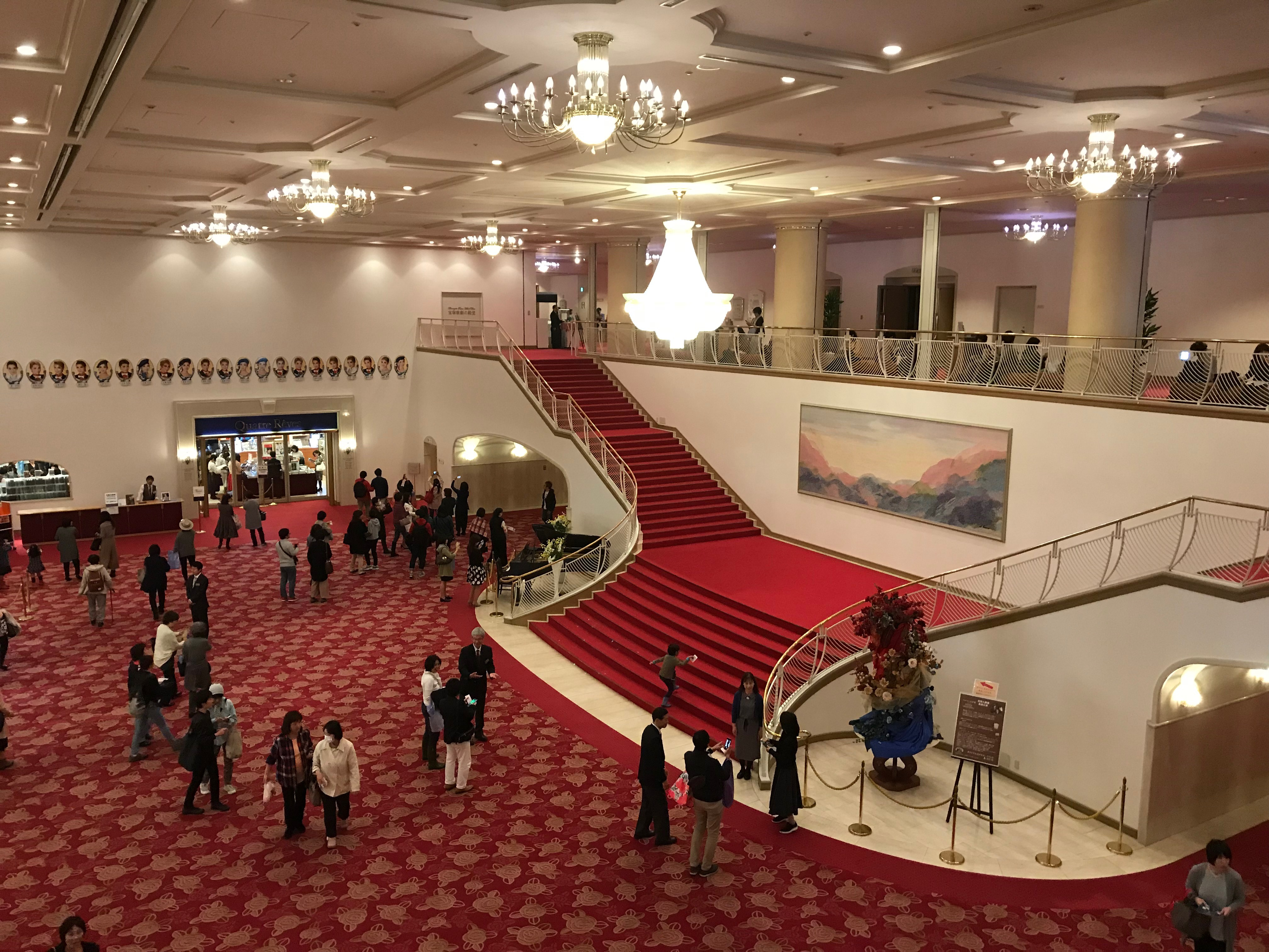 Takarazuka Grand Theater